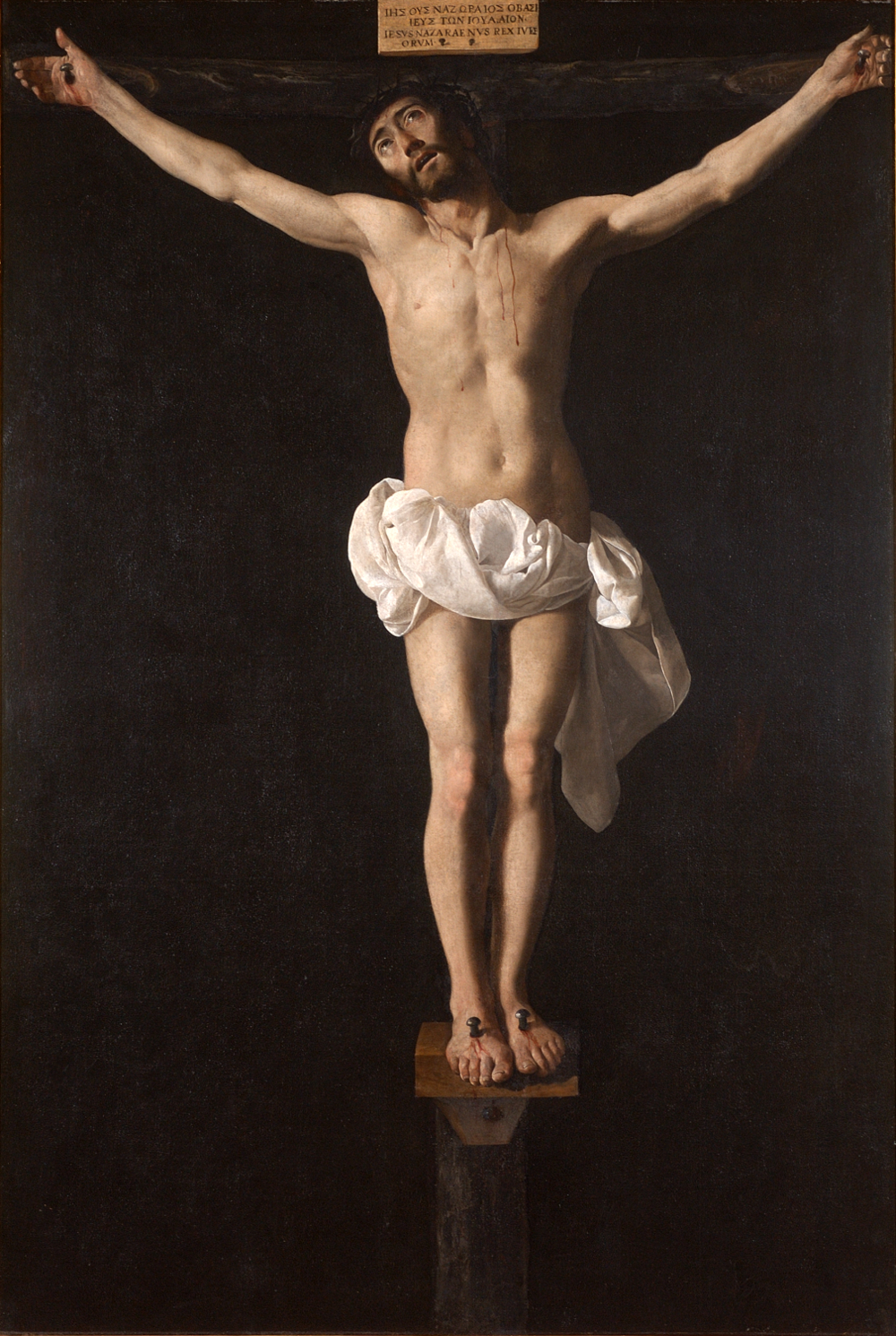 Jesús crucificado expirantelabel QS:Les,"Jesús crucificado expirante"